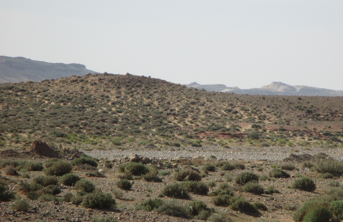 الأغواط